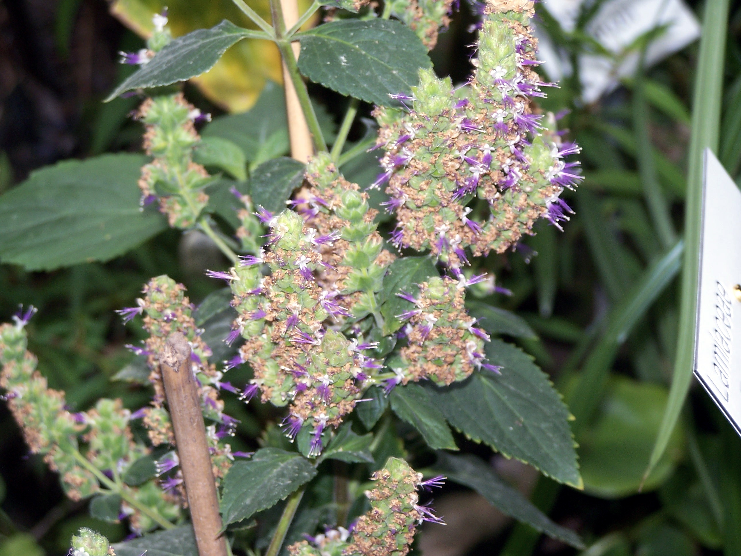 Pogostemon cablin 17 juin 2006 Vieux jardin botanique de Göttingen